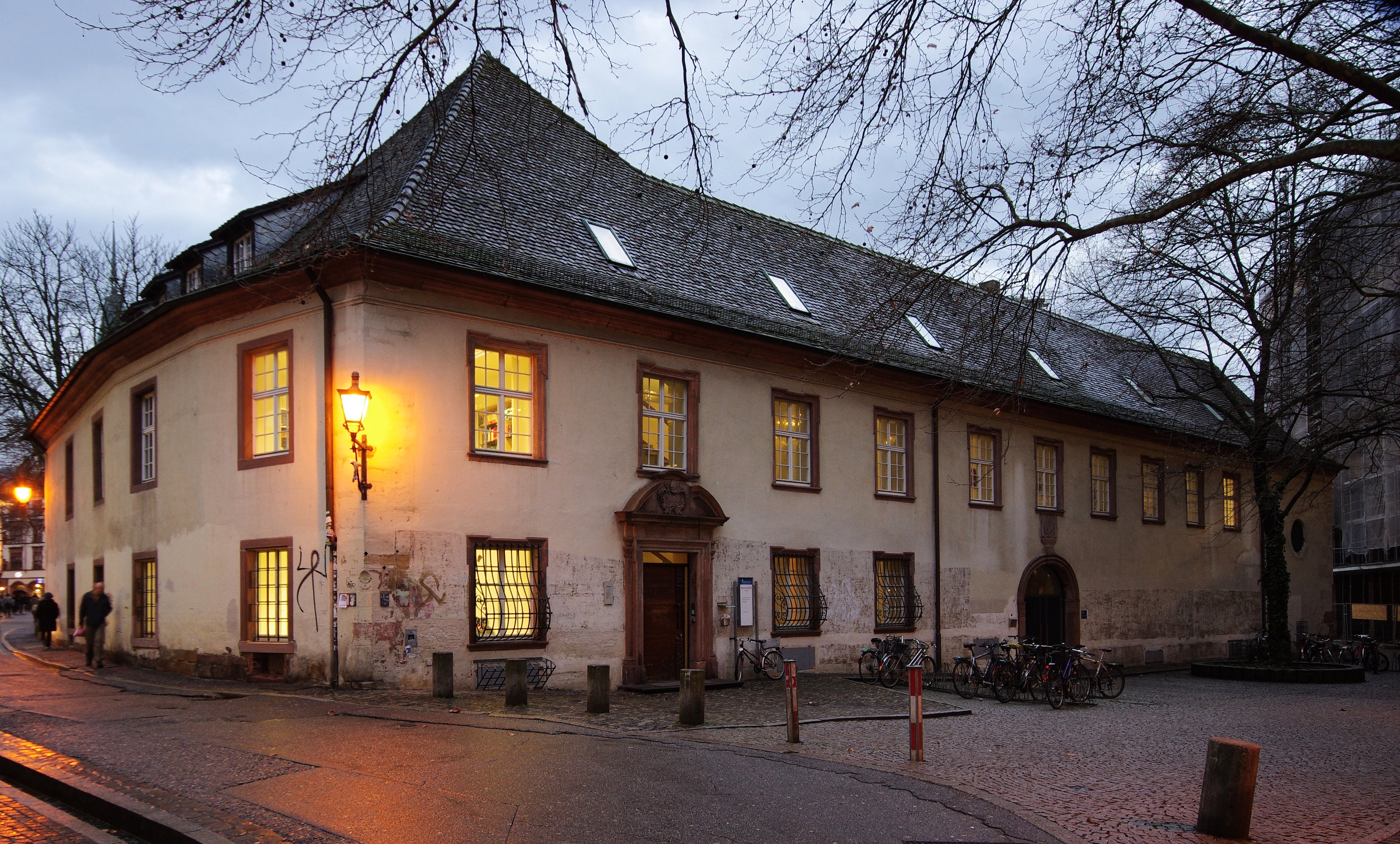 Peterhof Gesamtkomplex von der Niemensstraße